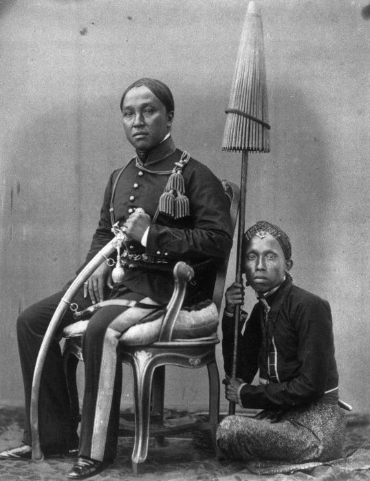 Foto. Pakoe Alam IV van het Prinsdom Pakoe Alam uit Djogjakarta, Midden-Java